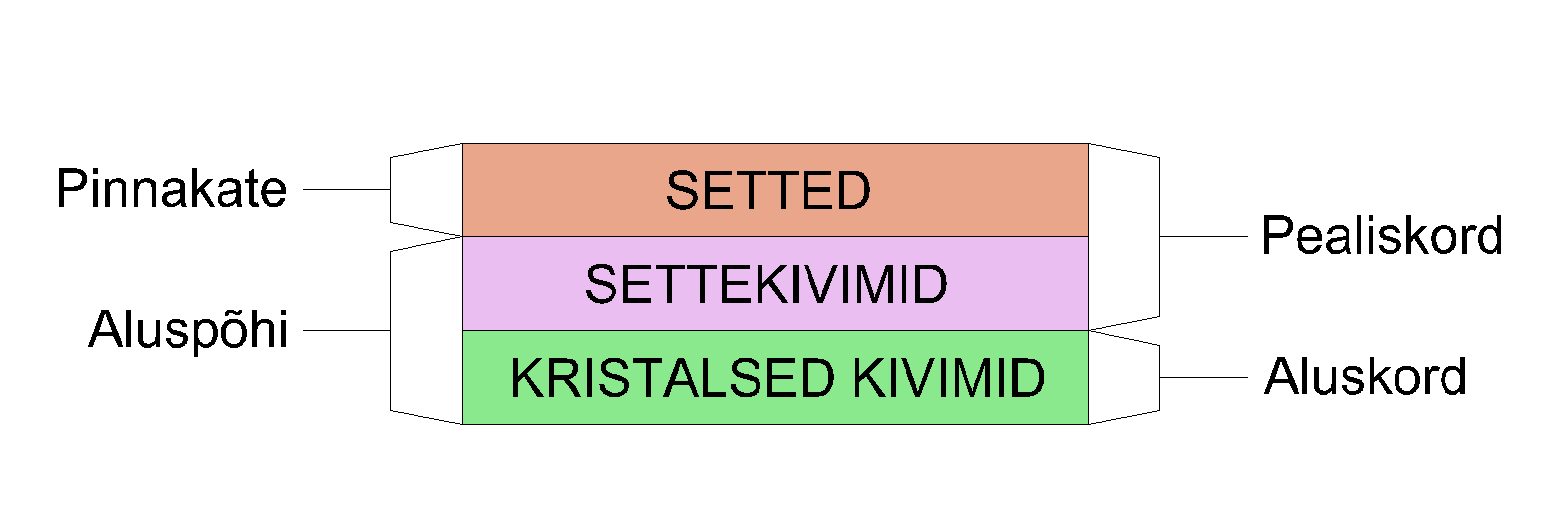 Aluskord,_pealiskord,_aluspõhi,_pinnakate